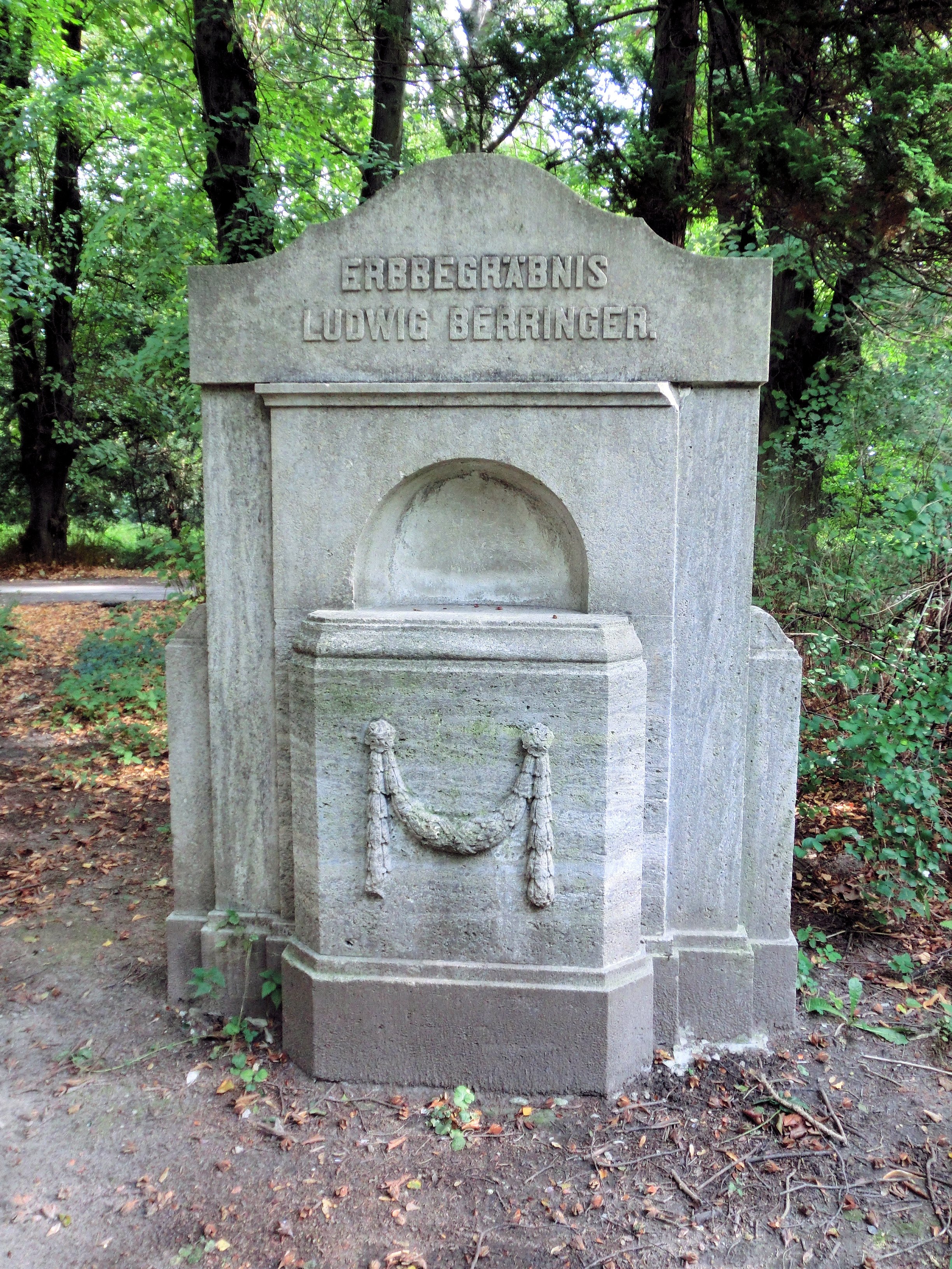 Lindenpark Rostock (ehemaliger Alter Friedhof), Grabstätte Ludwig Berringer